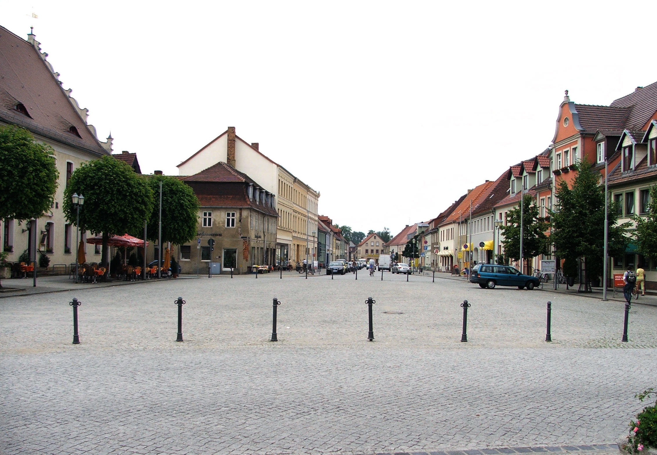 Center of Herzberg(Elster)